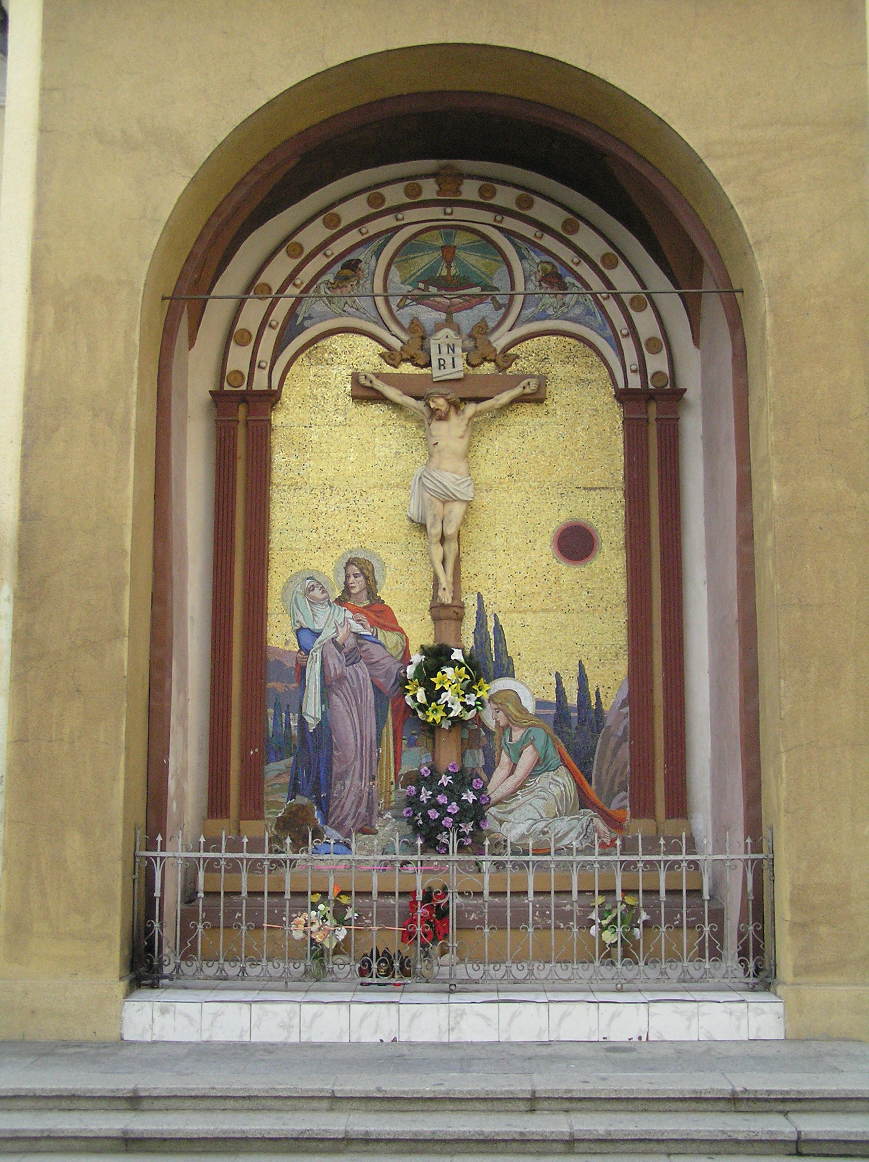 Žilina, Kostol Najsvätejšej Trojice, mozaika